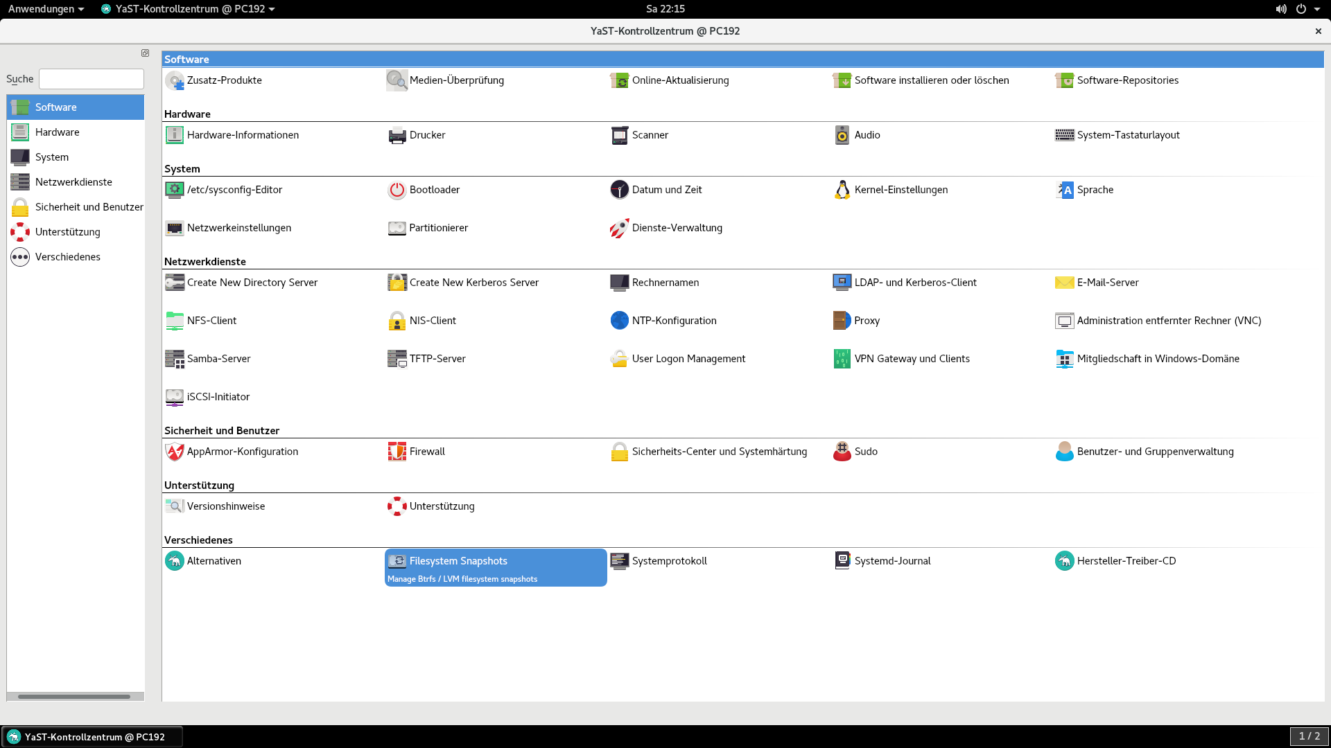 YaST